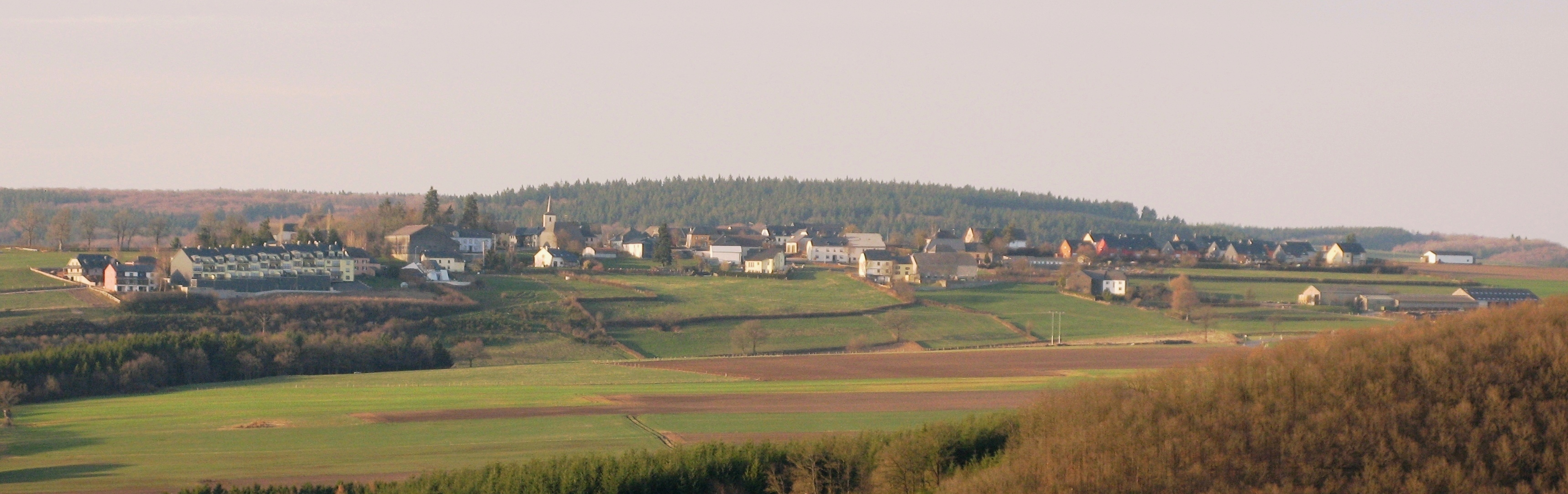 Näertreg vun der Nationalstrooss 26 aus gesinn. (Distanz: 2,5 km).